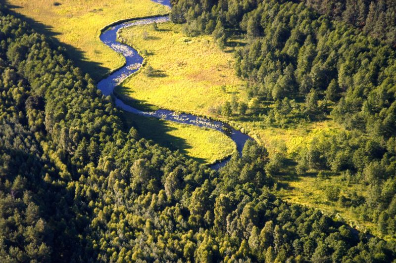 Rzeka Rurzyca